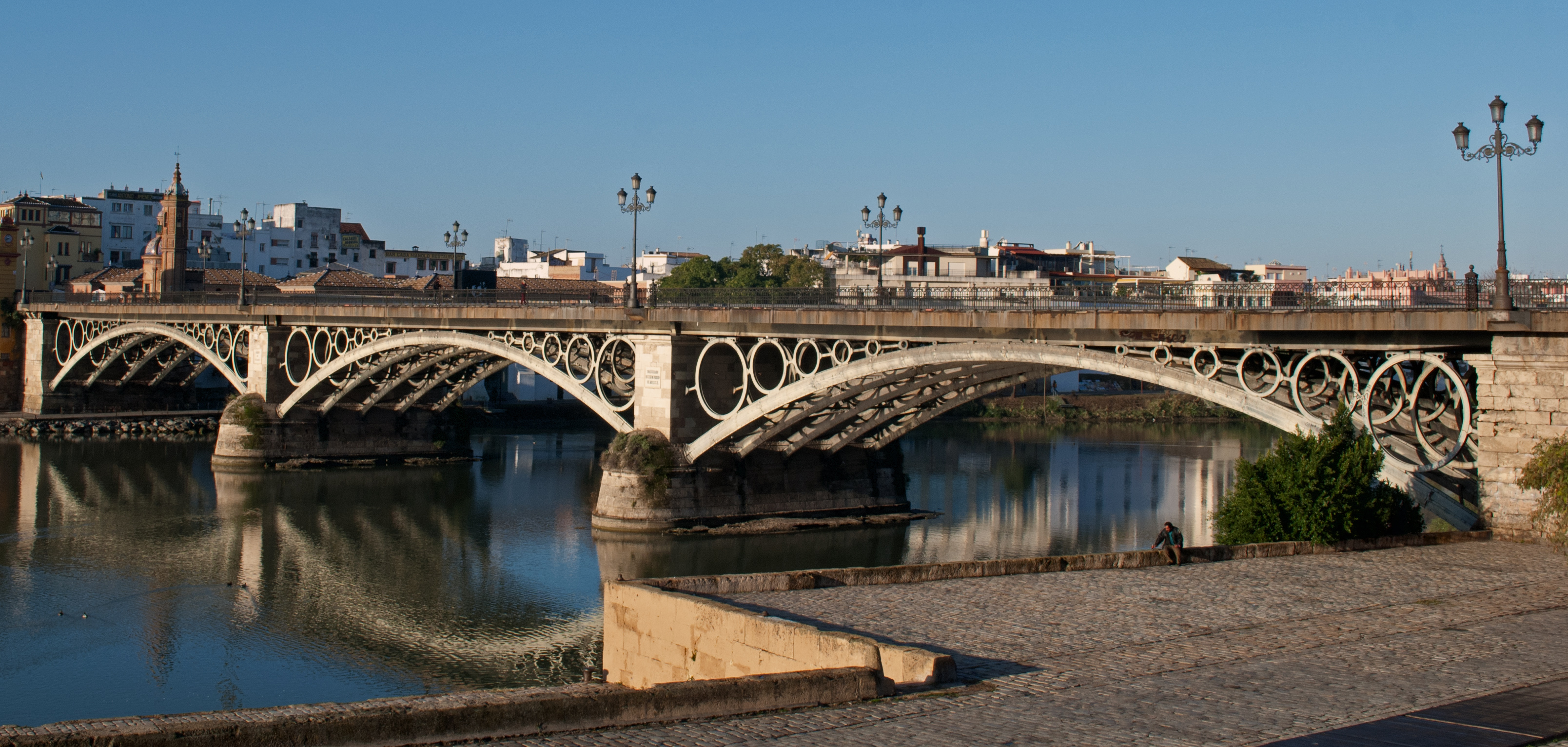 Puente de Isabel II, río Guadalquivir. Sevilla.